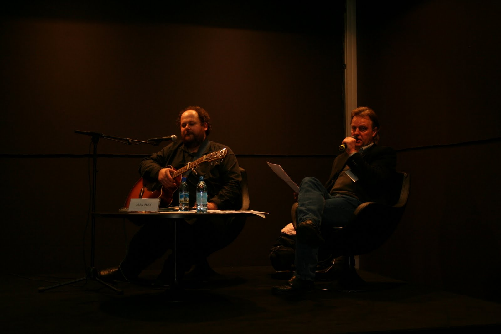 Helsingi raamatumess: Jaan Pehk laulab ja loeb, kõrval tõlgib Hannu Oittinen.